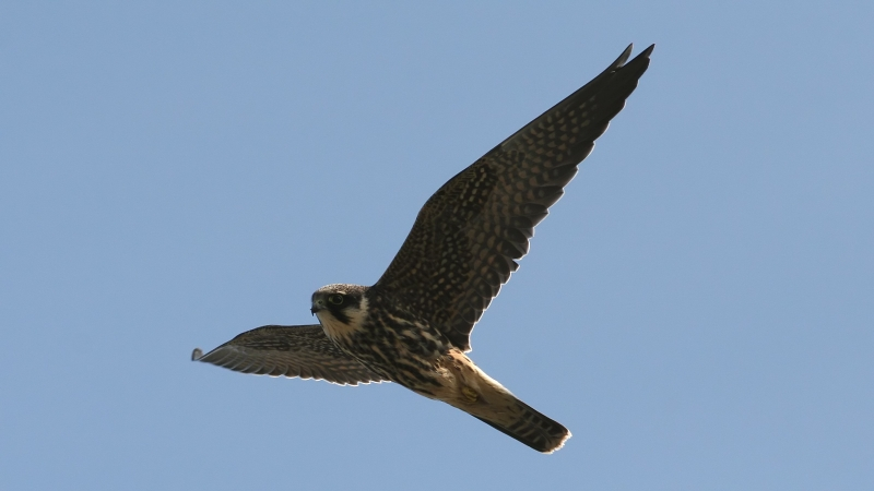 Hobby Falco subbuteo, Rheinspitz, Vorarlberg, Austria